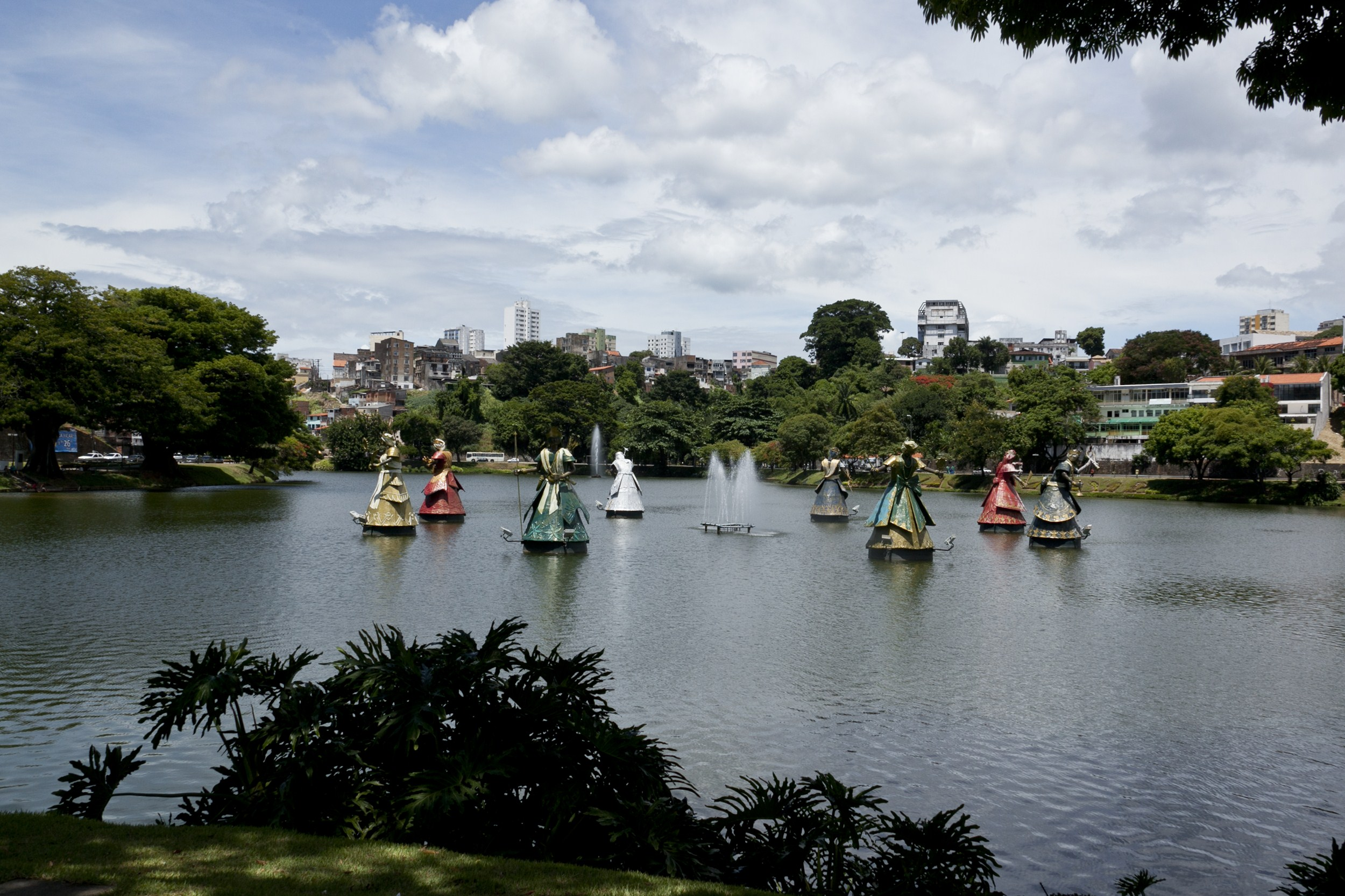 Orixás do Dique do Tororó.